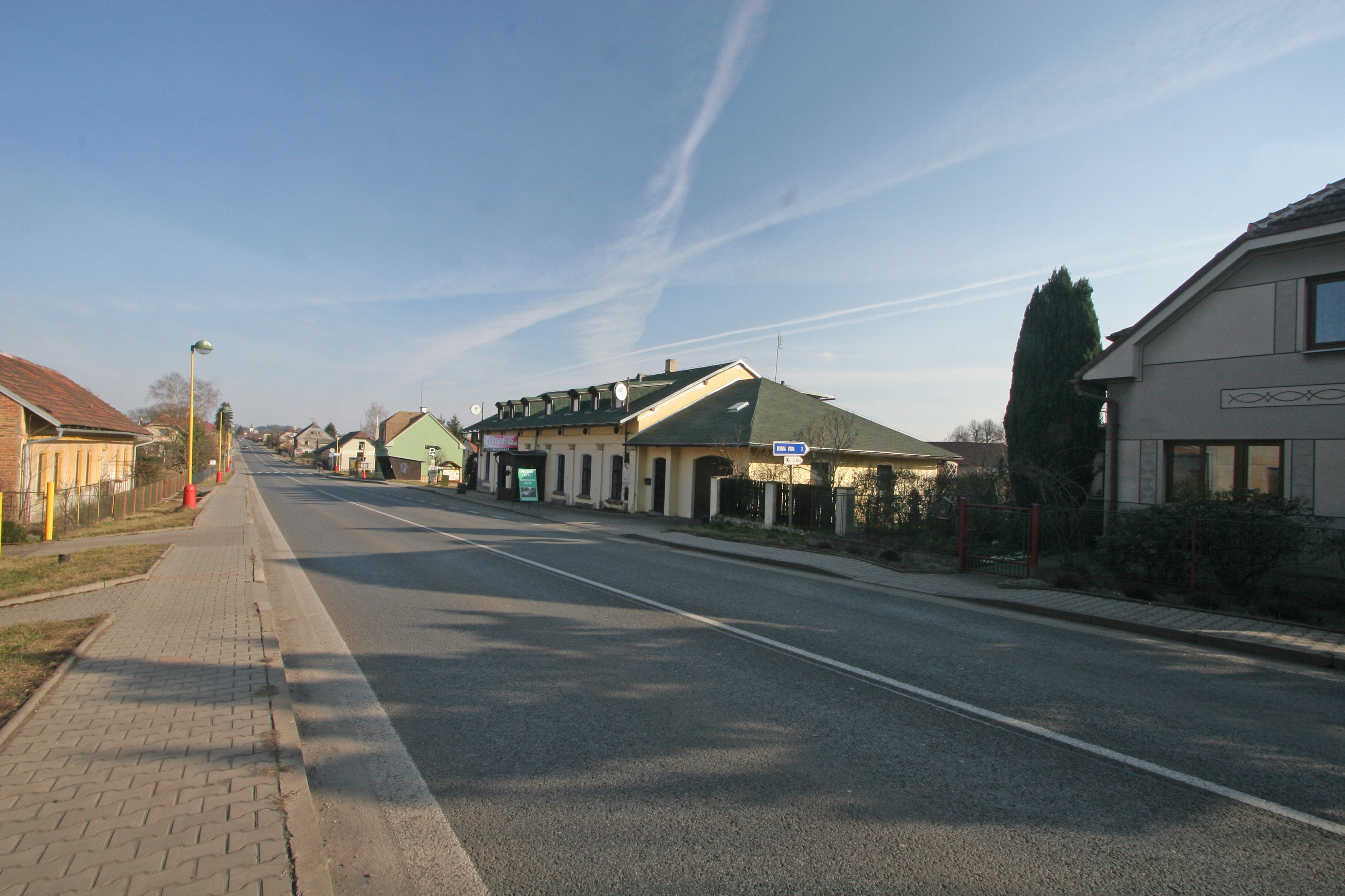 Bílsko u Hořic motorest